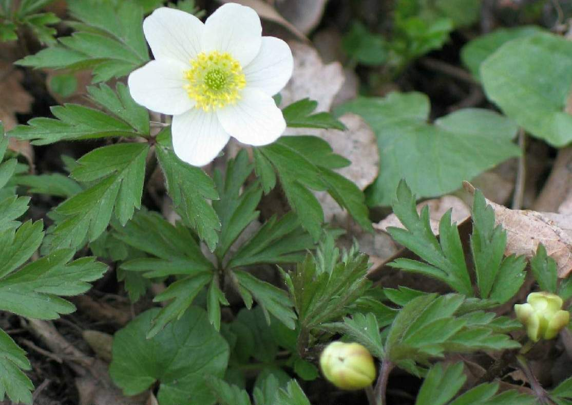 Buschwindröschen (Anemone nemorosa) mit offener Blüte und geschlossenen Blüten. Das Foto entstand im April in Schweden. Gut zu erkennen ist die Äderung der Blütenblätter bei der geöffneten Blüte. Außerdem ist auf der Fotografie zu erkennen, dass die Blätter „behaart“ sind. Auf dem Bild sind auch noch einige Scharbockskrautblätter zu sehen.